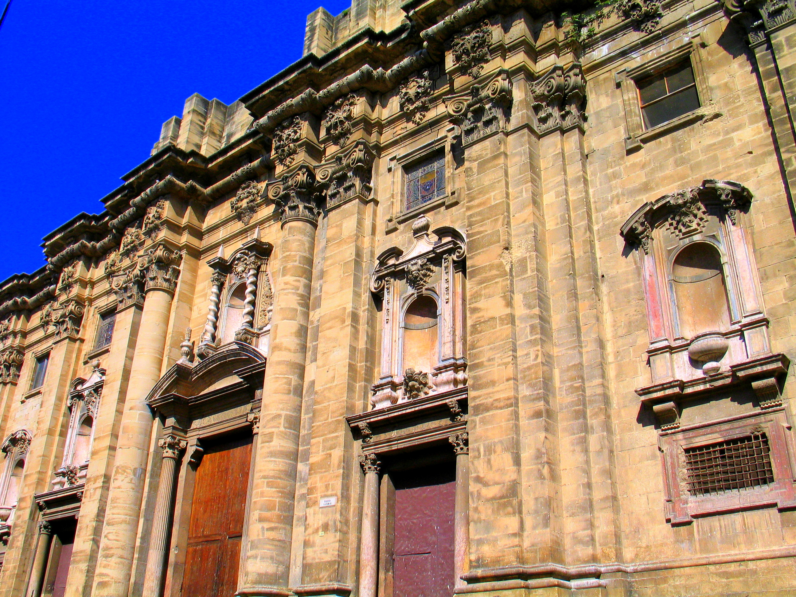 Façana de la catedral de Tortosa